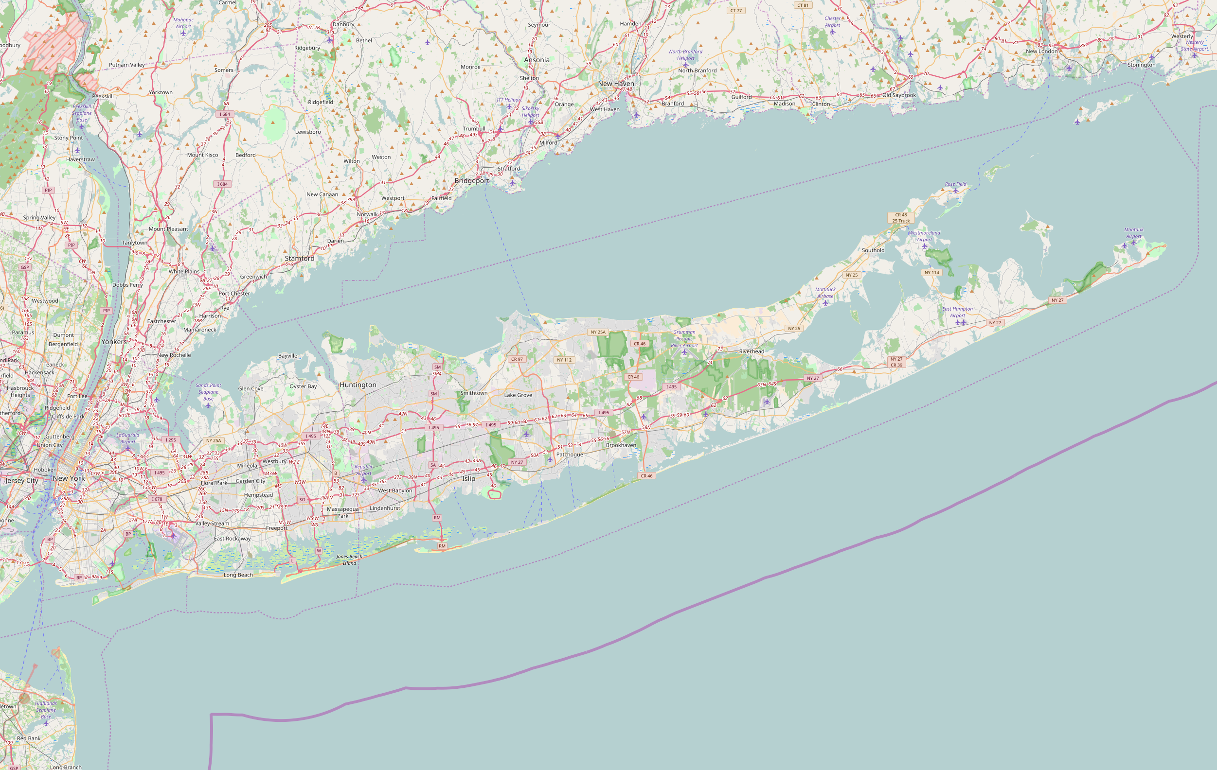 Mappa di Long Island Limiti geografici della mappa: N: 41.43° S: 40.30° W: 74.12° E: 71.76°